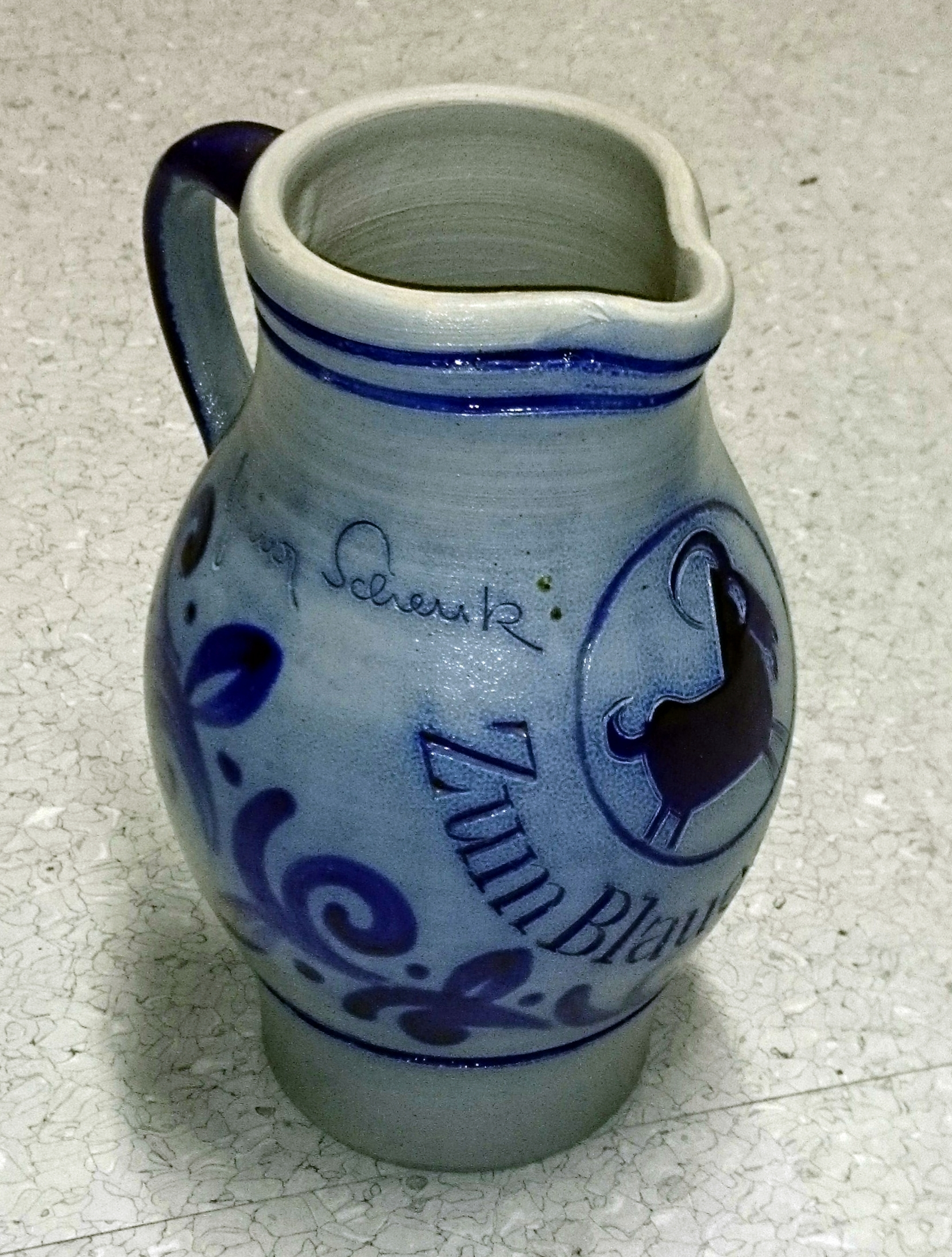 Original-Bembel verliehen 1978 von Heinz Schenk in der TV-Sendung "Zum Blauen Bock" an "Die Viel-Harmoniker".